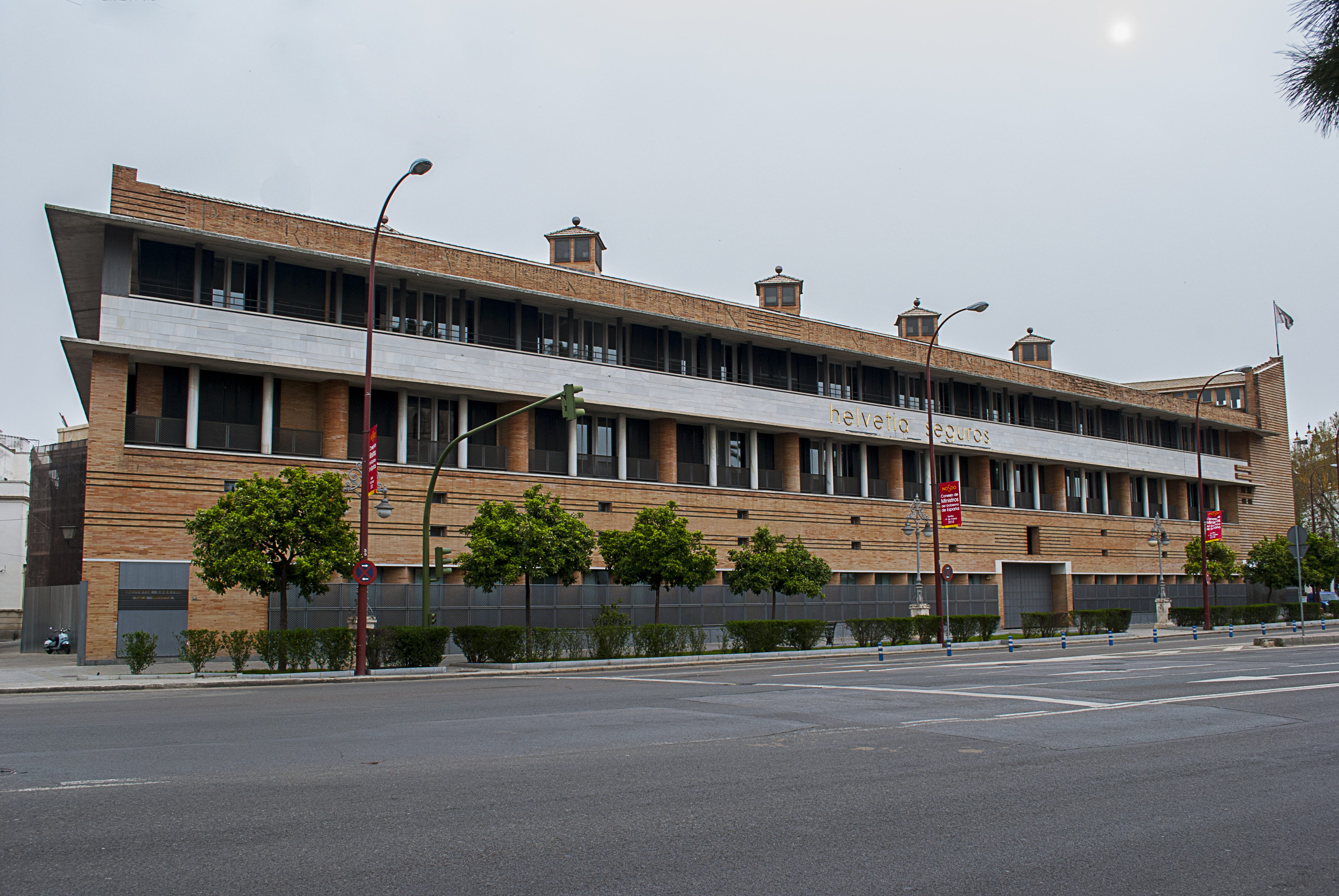 Edificio de Previsión Española, arquitecto Rafael Moneo, año (1982-1987), Sevilla